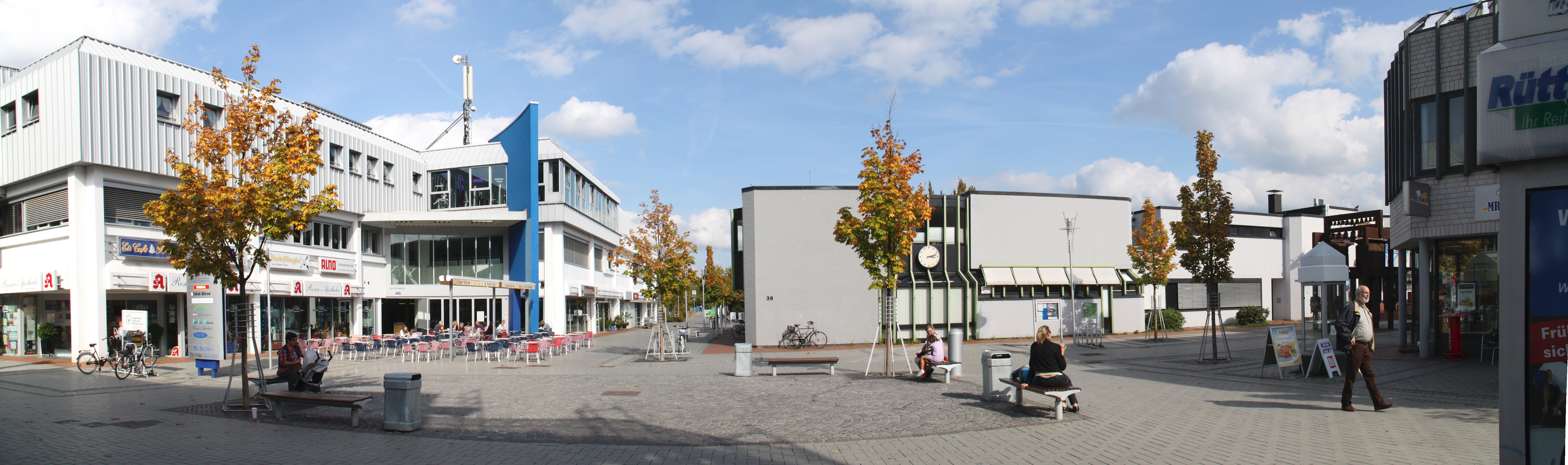 Meckenheim, Panorama / Impressionen Neuer Markt, zusammengesetzt aus drei Einzelbildern